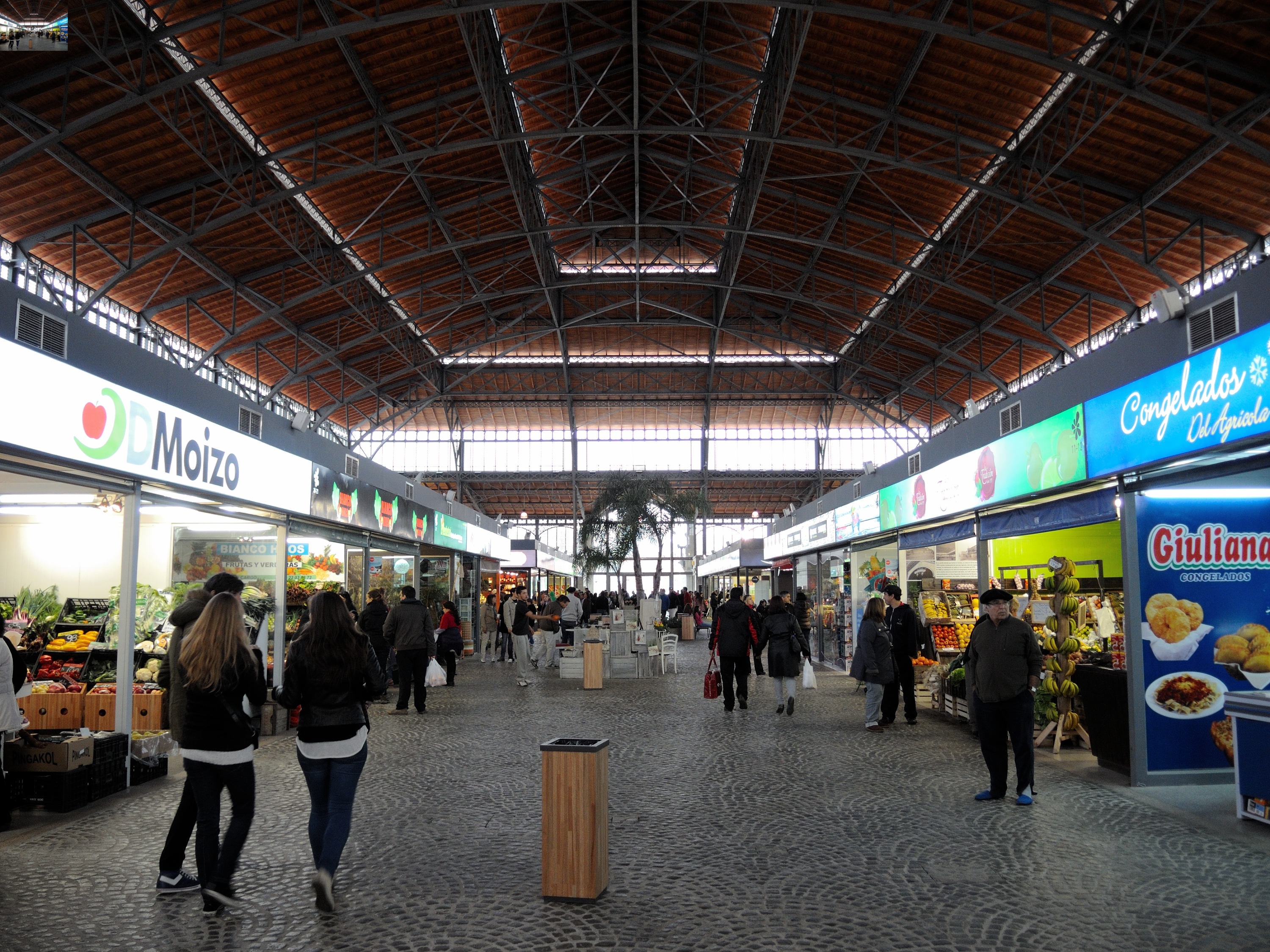 Interior del Mercado Agrícola de Montevideo, área central.